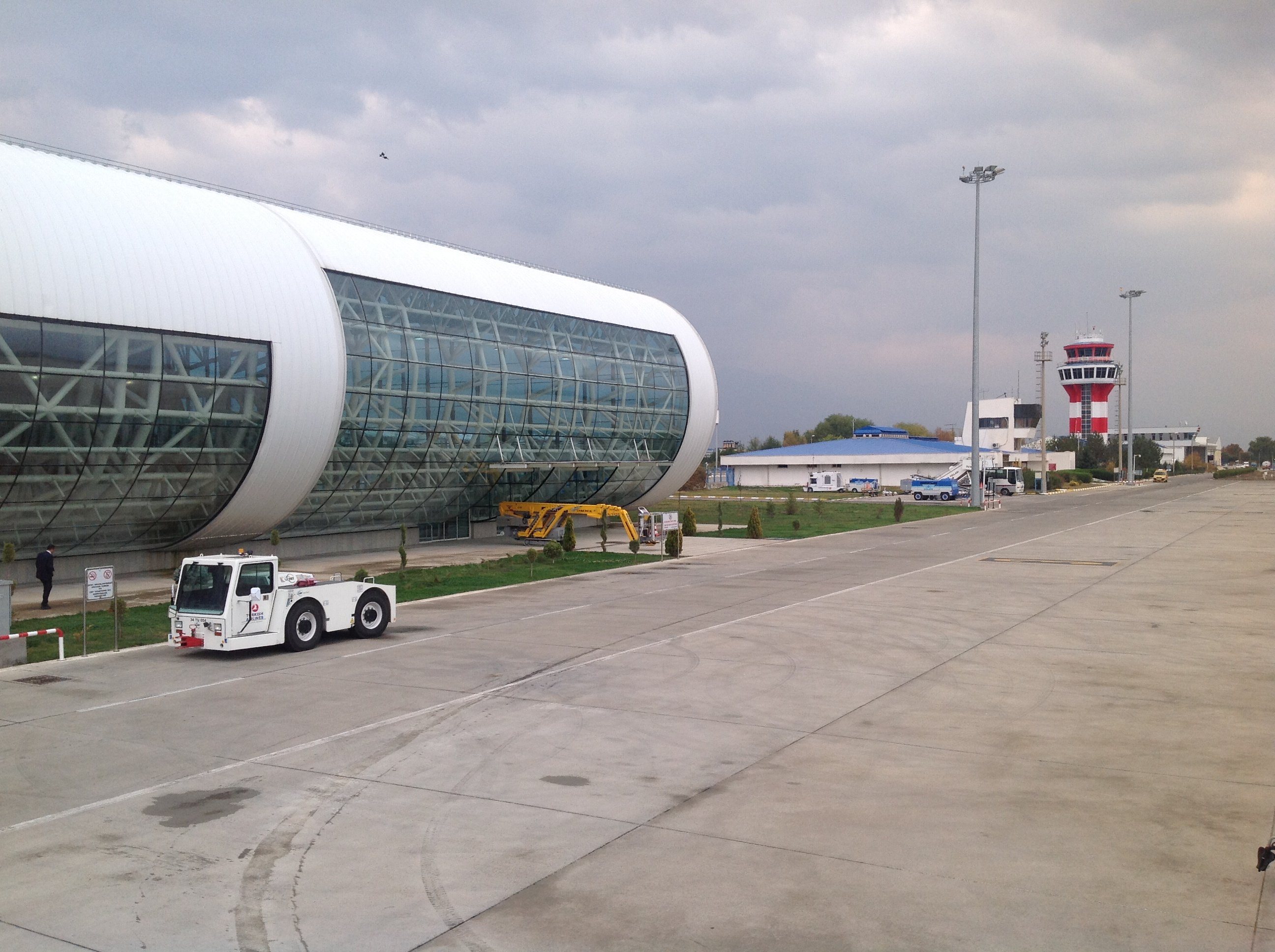 ERZINCAN CONTROL TOWER